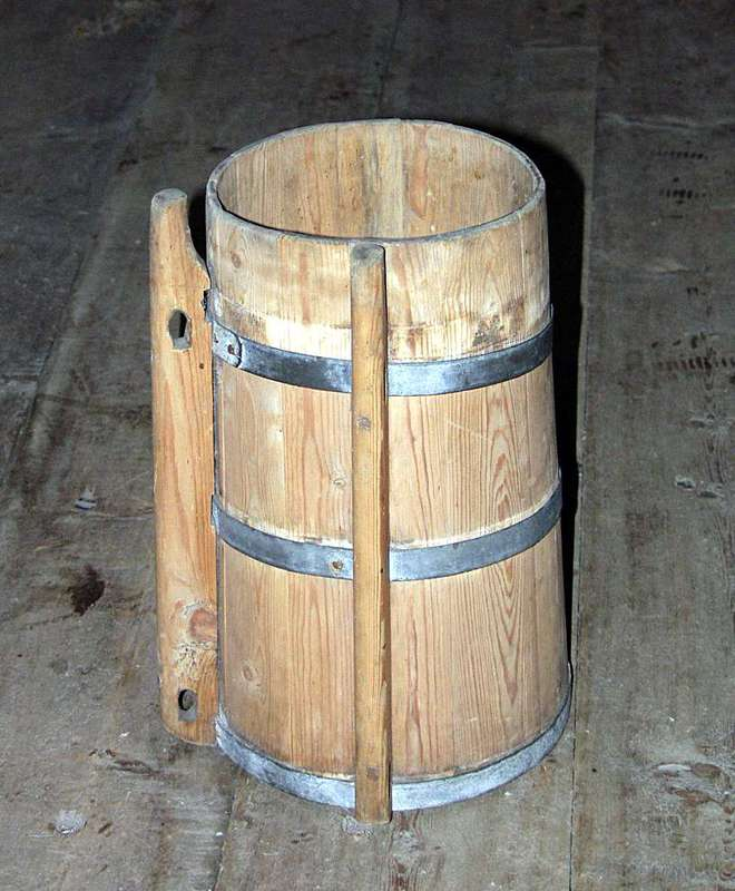 Ryggbøtte fra Hålandsdalen, Fusa i Hordaland, antakelig fra omkring 1900. Høyde 48 cm. Foto Haakon Harriss / Norsk Folkemuseum, NFL.11133.